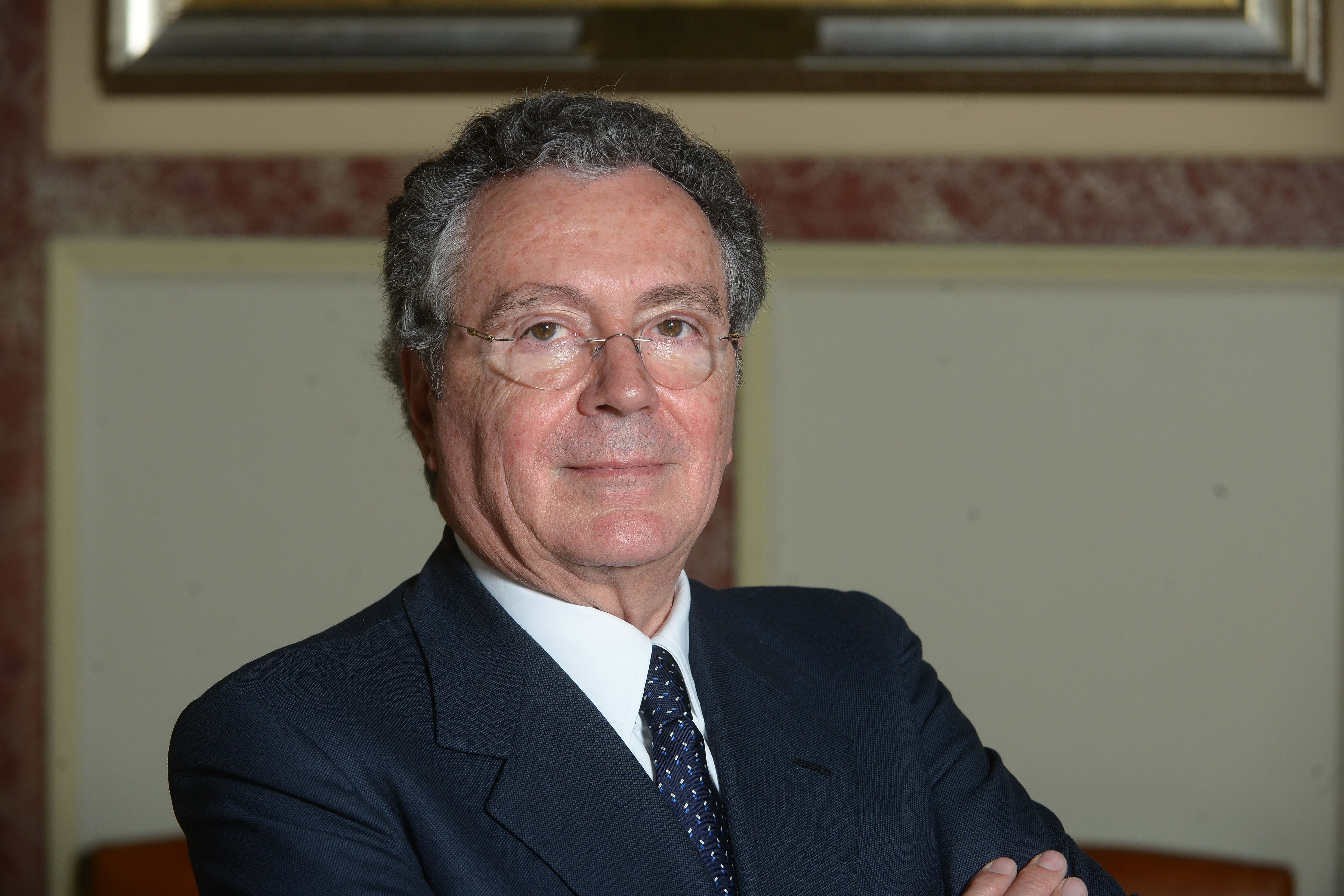 Gian Maria Gros-Pietro